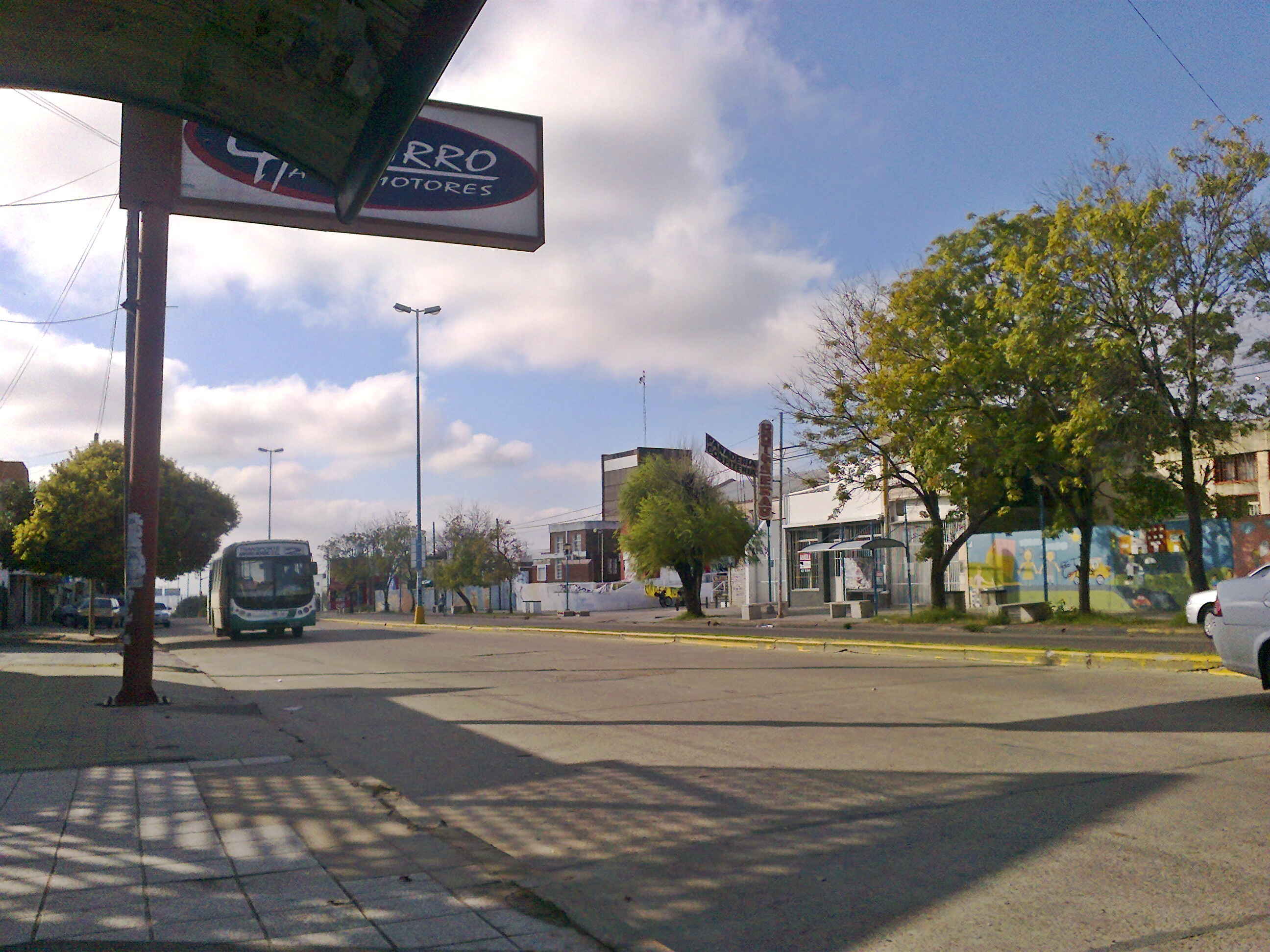 Avenida Francisco Ramírez de Paraná al 1100.